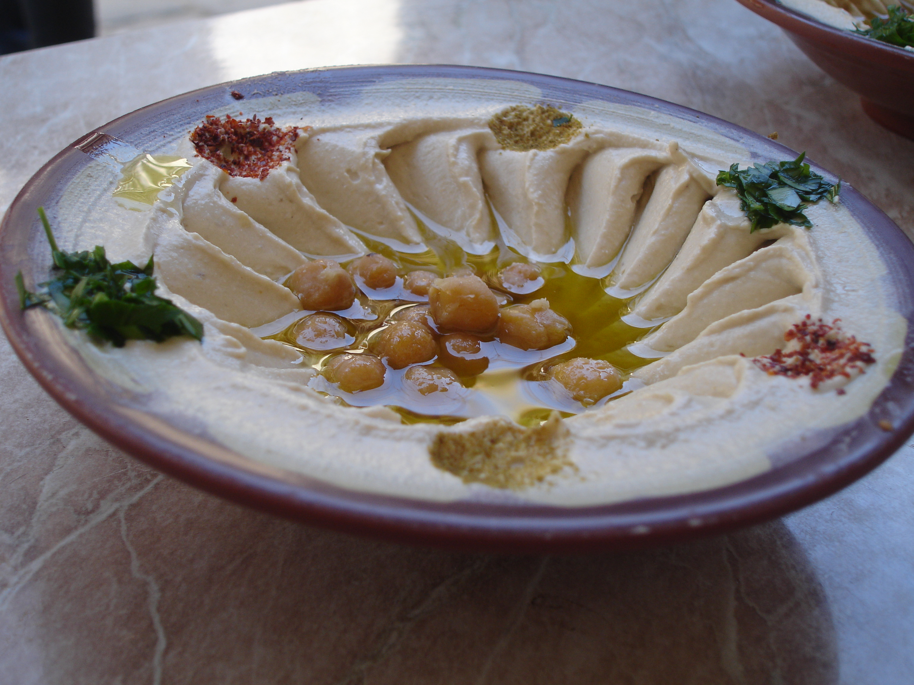 اكلة من التارث السوري.....